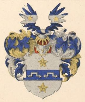 Sternstrahli suguvõsa aadlivapp.